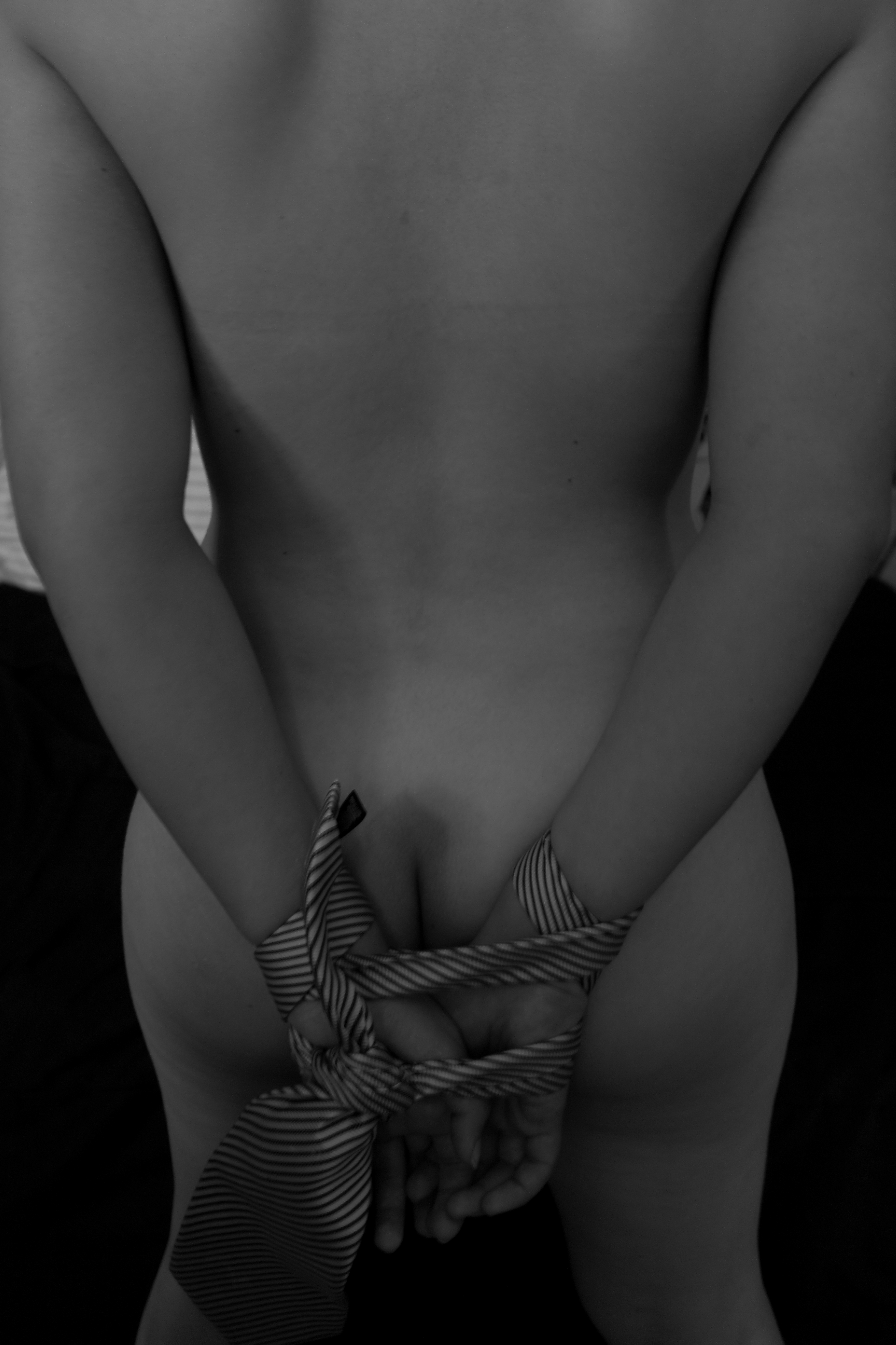 Inmovilización